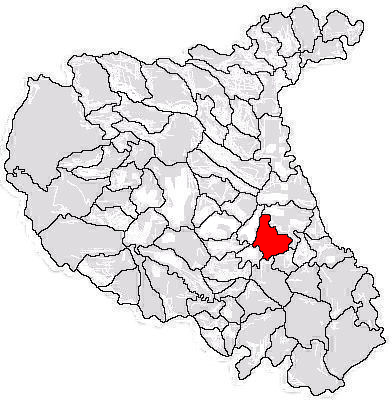 Categorie:Hărţi ale judeţului Vrancea